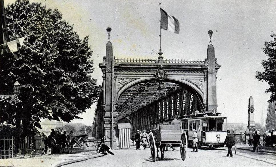 Détail de la carte postale ancienne éditée par Cigogne, n°658Tramway de la ligne 1 Gare de Kehl - Gare centrale arrivant par le pont du Rhin ; motrice type D n° 62 construite par Herbrandt (Cologne) en 1898, équipement électrique par Thomson.